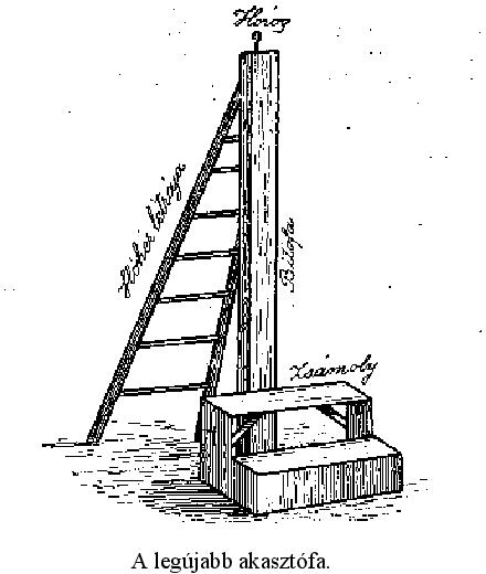 A legújabb akasztófa ábrája. K. Nagy Sándor: A hóhér és a halálbüntetések, Különlenyomat a Csendőrségi Lapok 1914. évi 40—43. számaiból 30-31. oldal